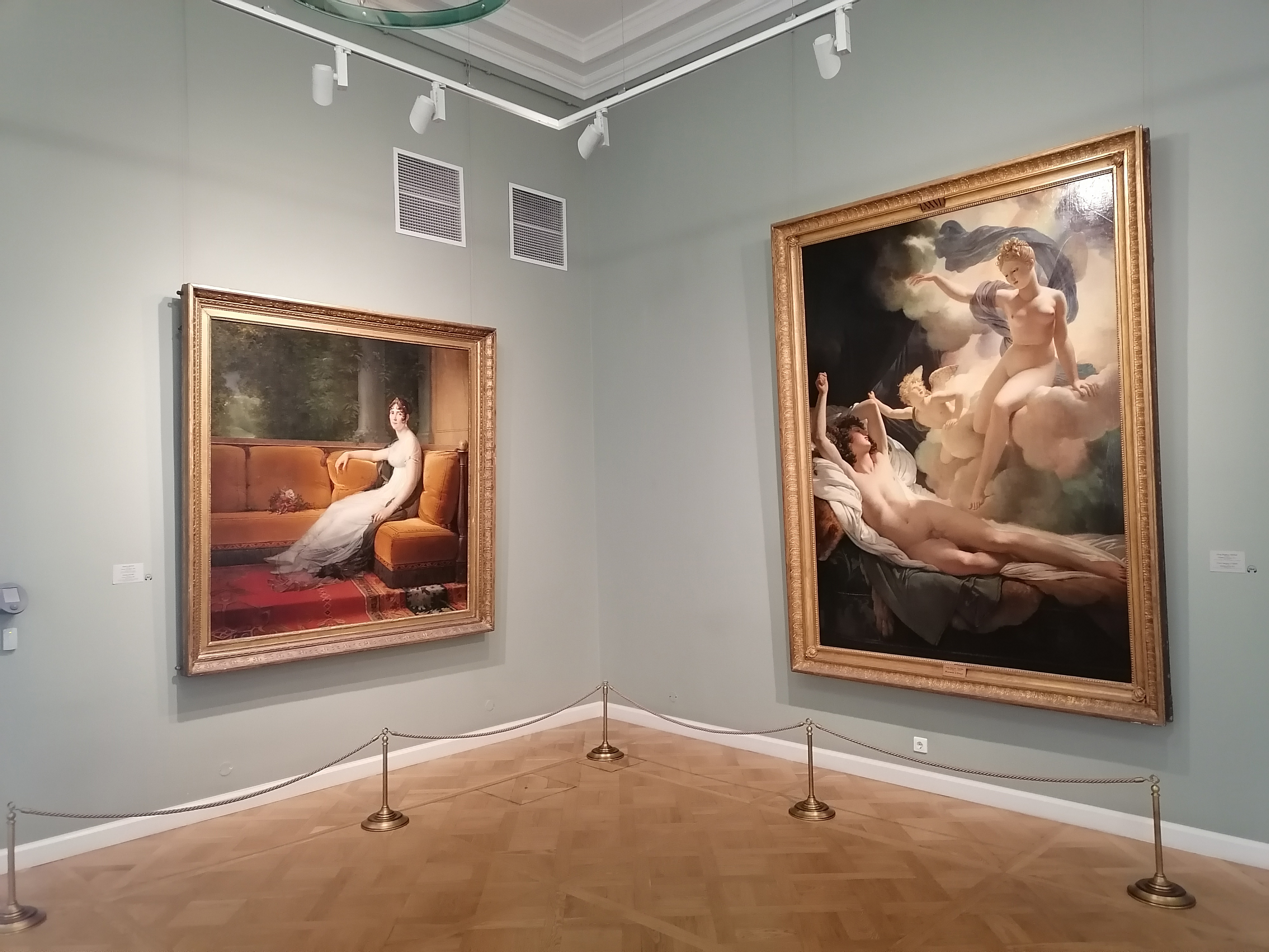 Эрмитаж, здание Главного штаба, зал 303 - Франсуа Жерар "Портрет Жозефины" и Пьер-Нарсис Герен "Морфей и Ирида"